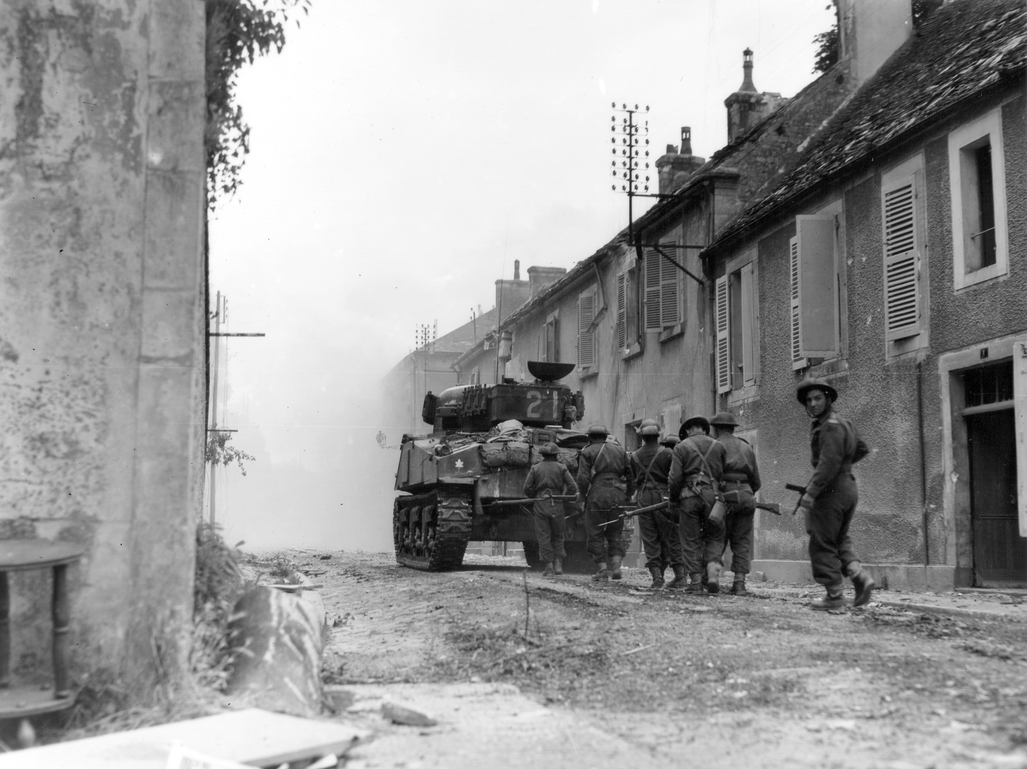 Un char Sherman des Sherbrooke Fusiliers couvrent les soldats fusiliers Mont-Royal dans une rue de Falaise.